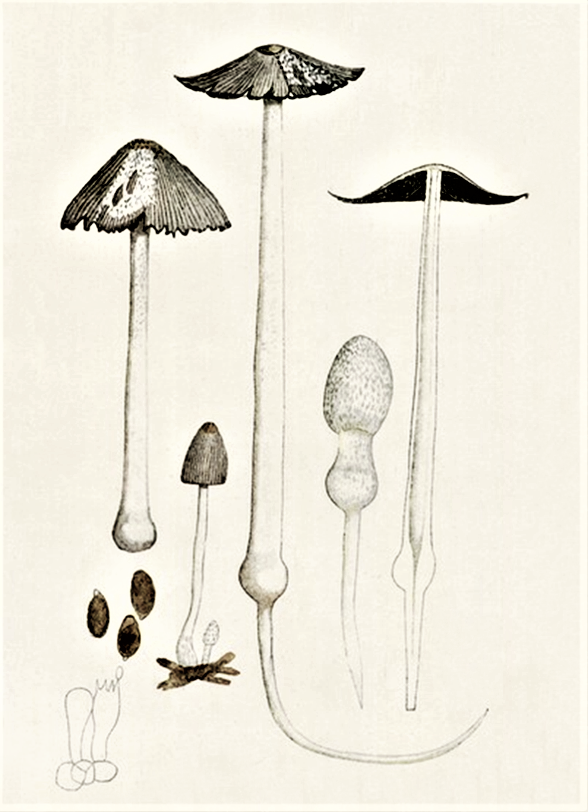 Giacomo Bresadola: Coprinus fimetarius, heute Coprinopsis cinerea (Schaeff., 1774) Redhead, Vilgalys & Moncalvo (2001)